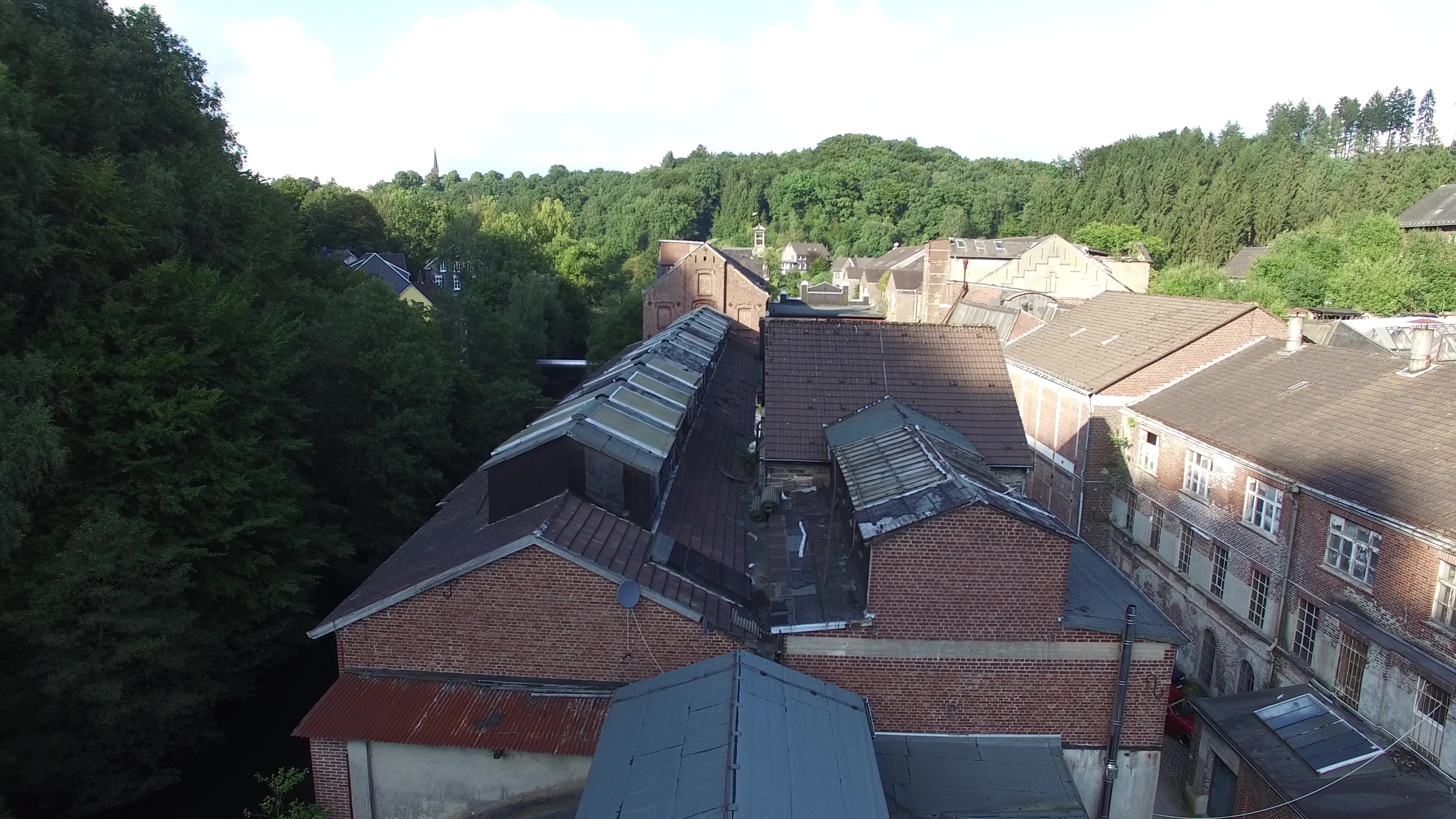 Alte Fabrik der Fa. Hardt&Pocorny in Radevormwald-Dahlhausen: Werkshallen